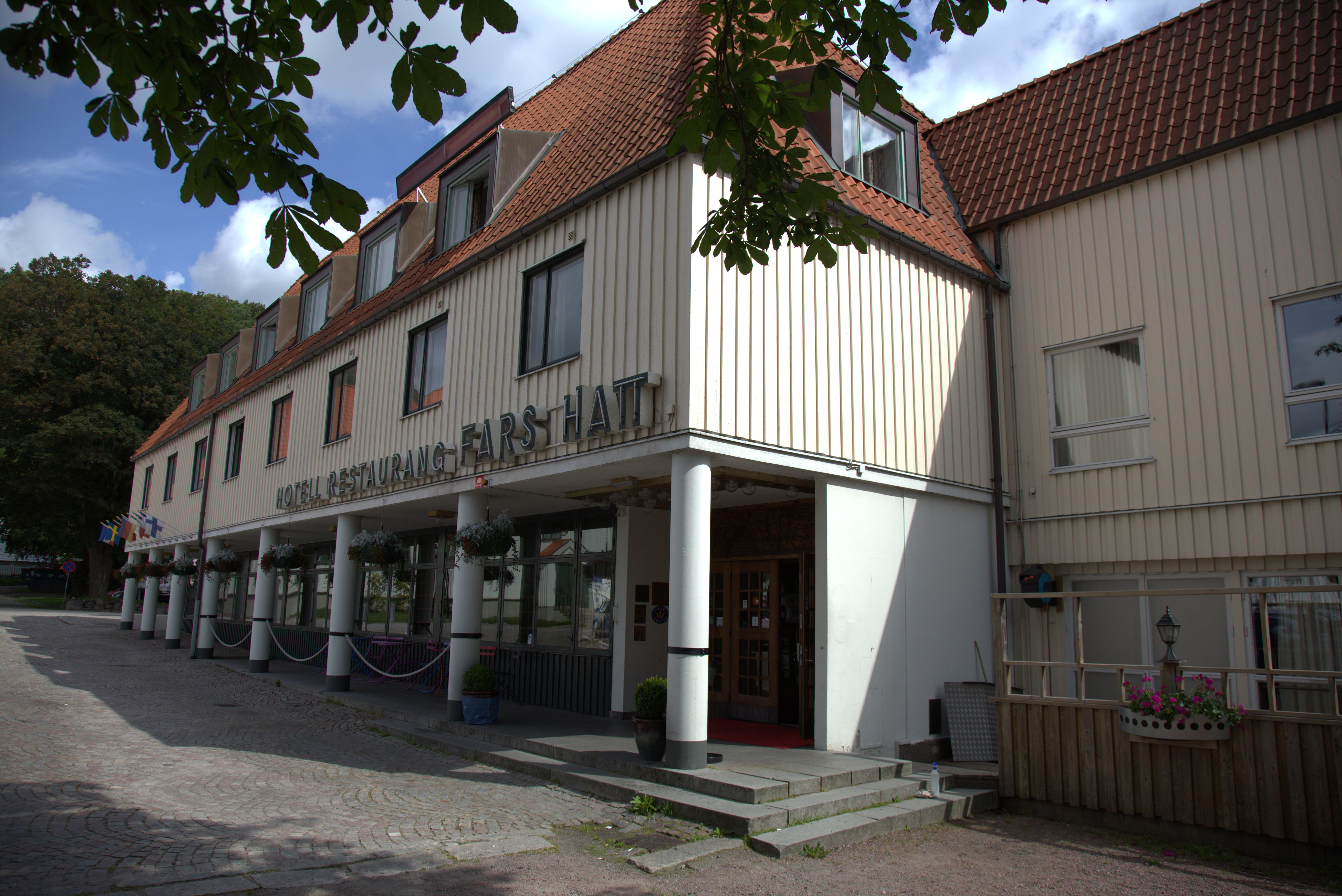 Fars hatt i Kungälv.